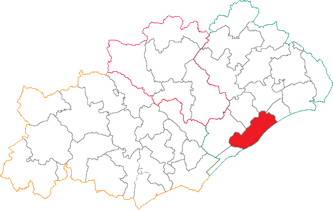 Situation du canton dans le département de l'Hérault.